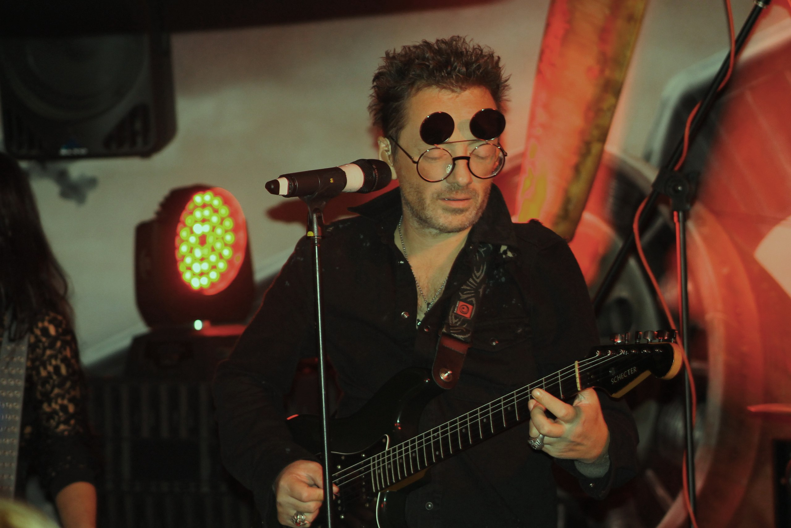 Концерт Глеба Самойлова и проекта Матрикс в гриль-баре Крылья. Калуга, 2016.